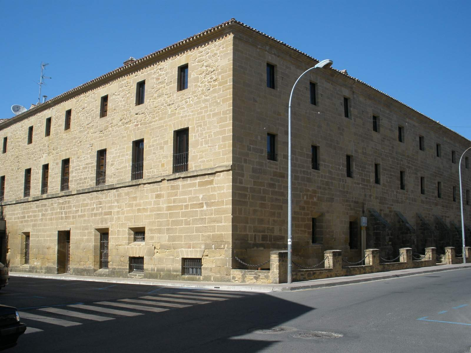 Ex Convento de San Agustín, actual Hotel Los Agustinos (Haro, La Rioja, España)